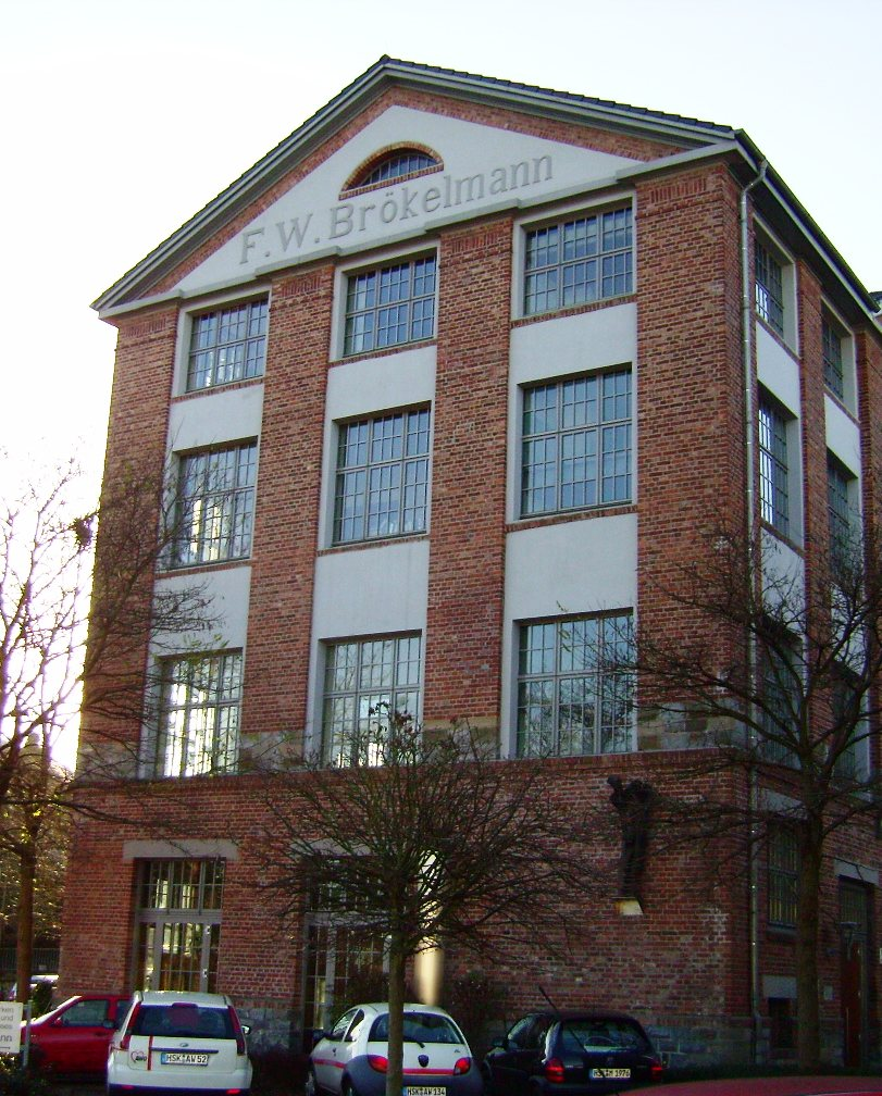 Fabrikgebäude F.W. Bröckelmann